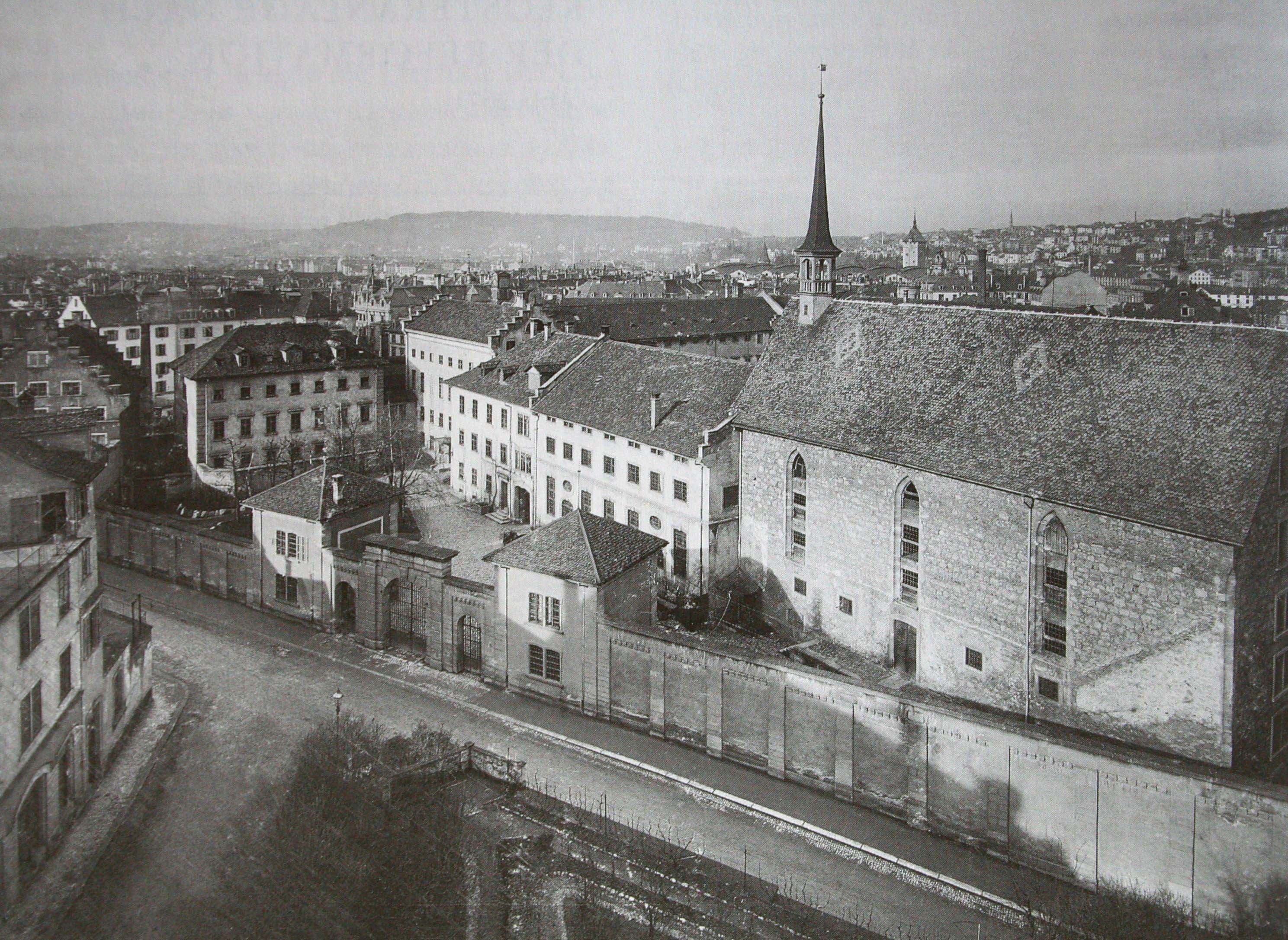 Strafanstalt Oetenbach in Zürich, Ansicht von Südosten, Foto 1900